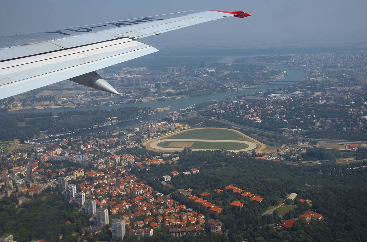 Хиподром у Београду. Слика из авиона. Аутор: Драган Жебељан, 2009.год.